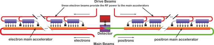 מבנה המנגיש הקומפקטי הקווי